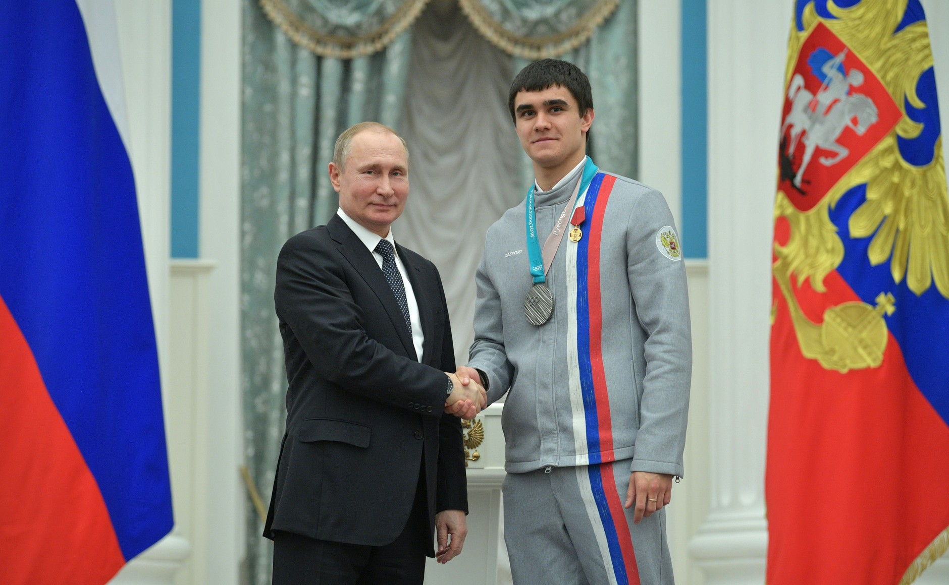 С серебряным призёром Игр по скелетону Никитой Трегубовым